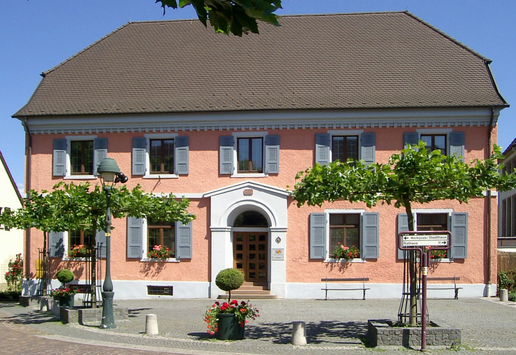 Altes Schul- und Rathaus, heute Stadtmuseum in Neuenburg am Rhein